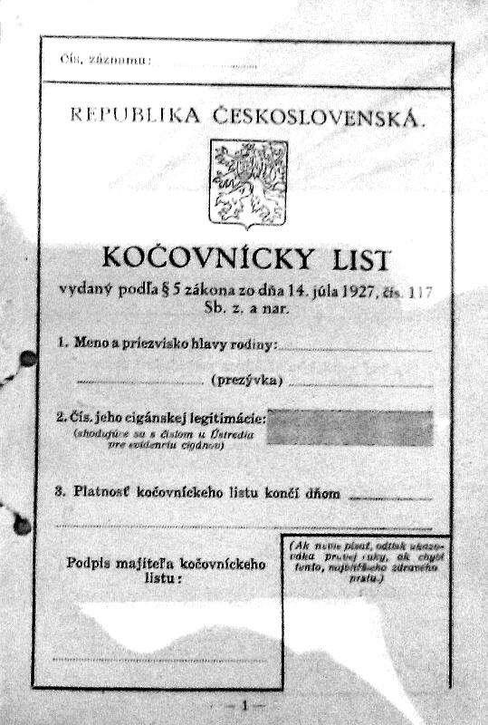 Kočovnícky list z Prvej Československej Republiky